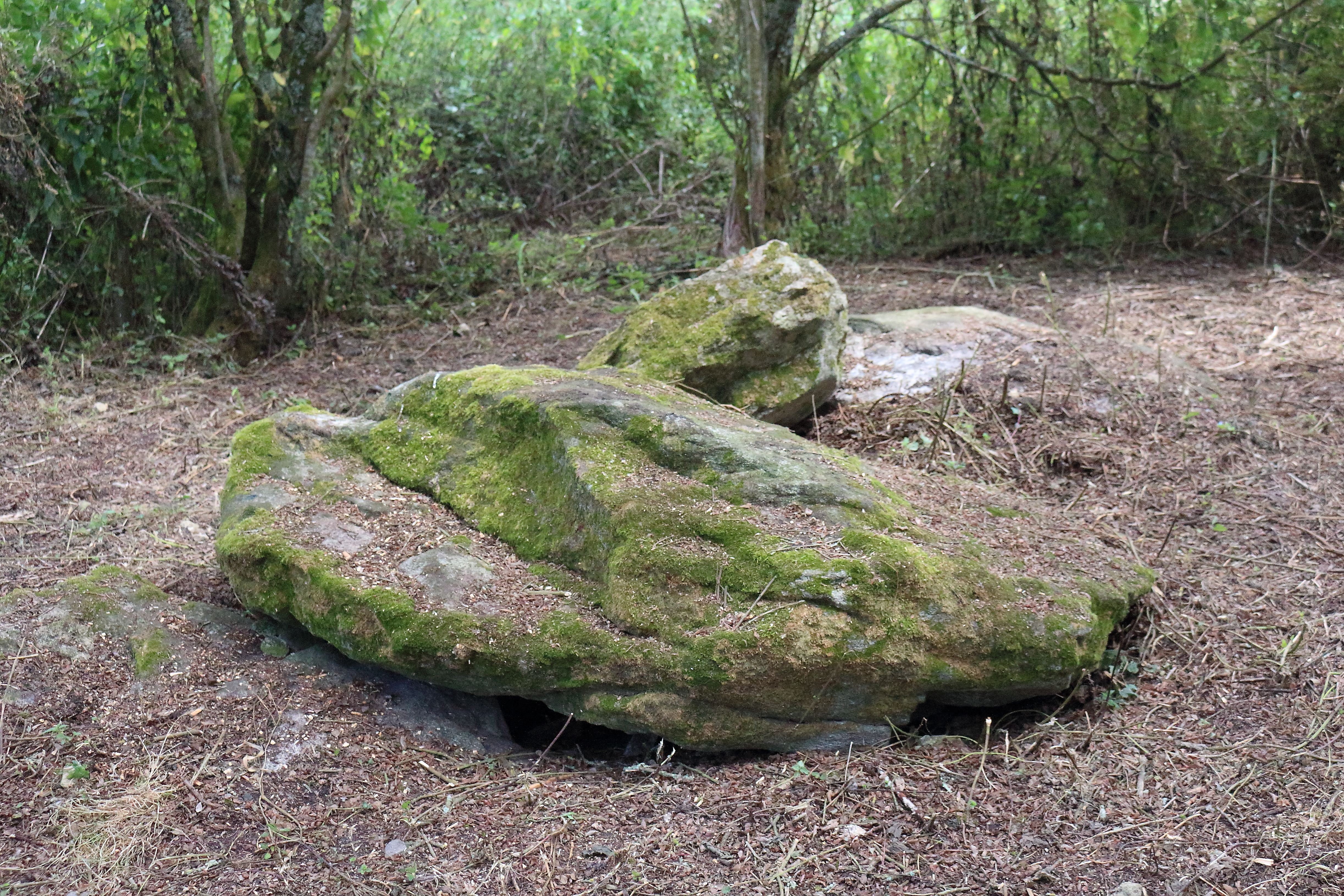 Vue d'ensemble des sépultures mégalithiques de la Butte aux Gorzeaux, en Brière. Commune de Saint-Joachim, Loire-Atlantique, Pays-de-la-Loire, France.